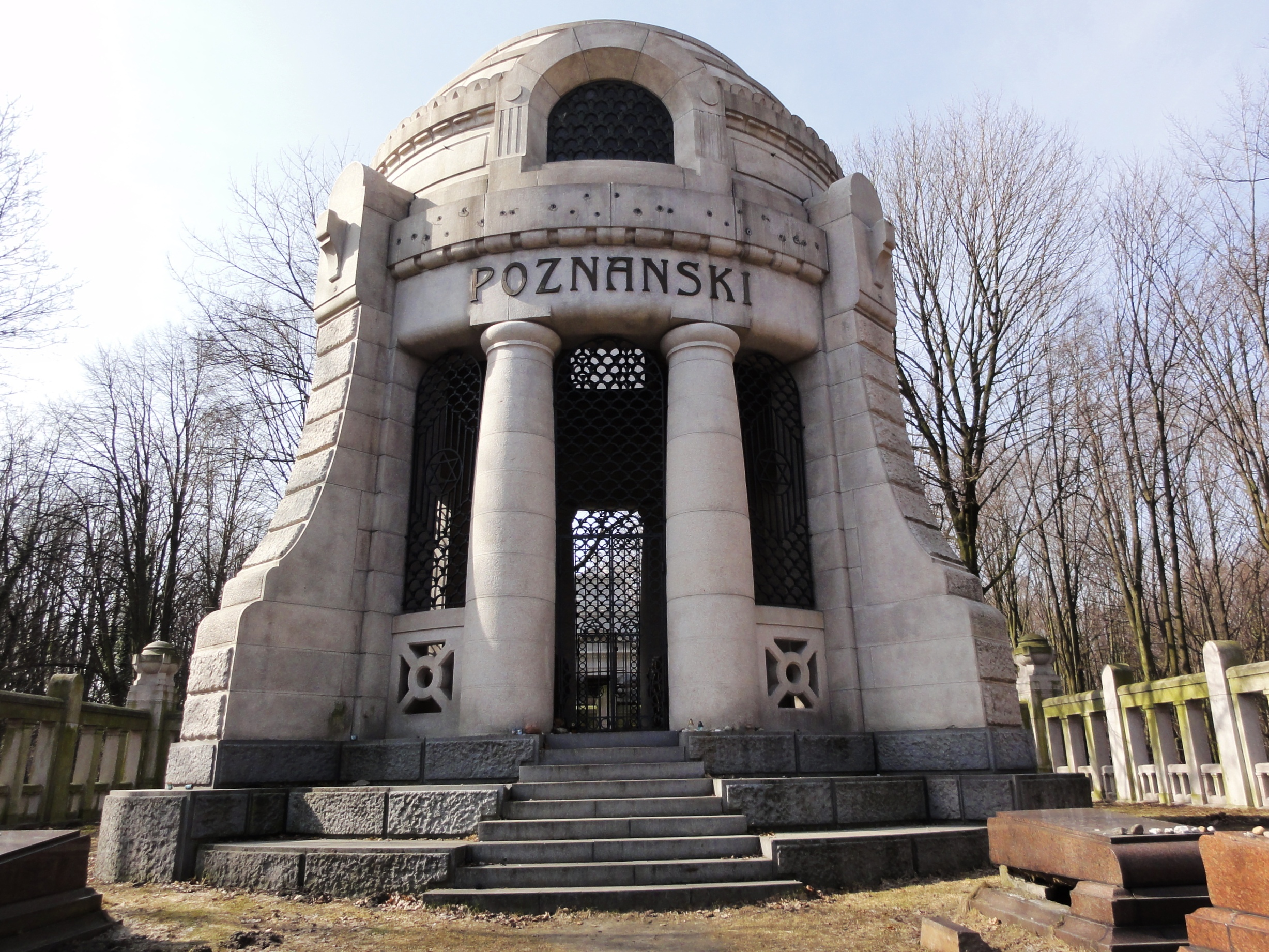 אחוזת קבר משפחת פוזננסקי בבית העלמין היהודי בלודז'